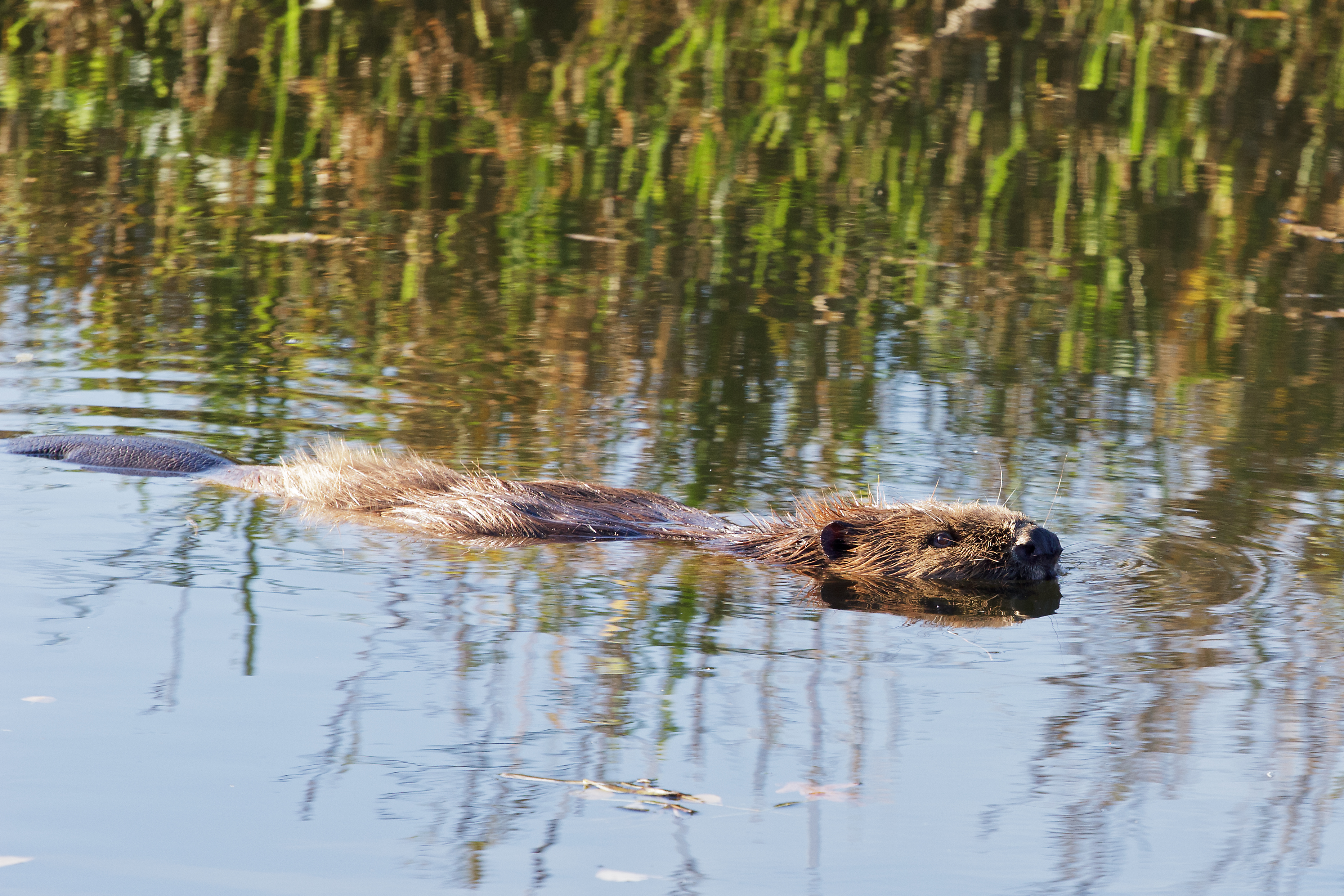 Biber (Castor fiber) in der Tollense, aufgenommen im Landschaftsschutzgebiet Tollensetal: L 74a